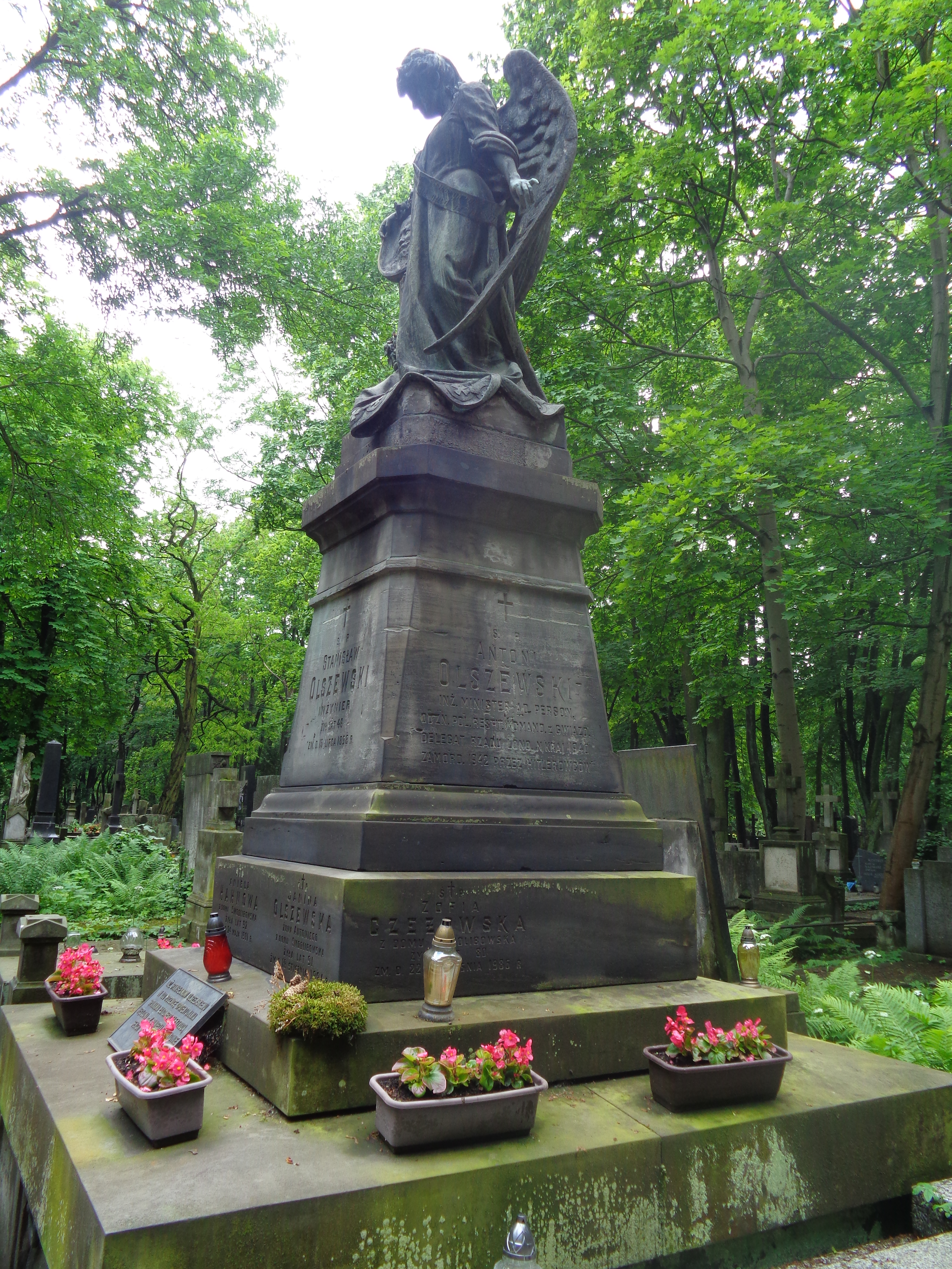 Grób ministra Antoniego Olszewskiego na Cmentarzu Powązkowskim